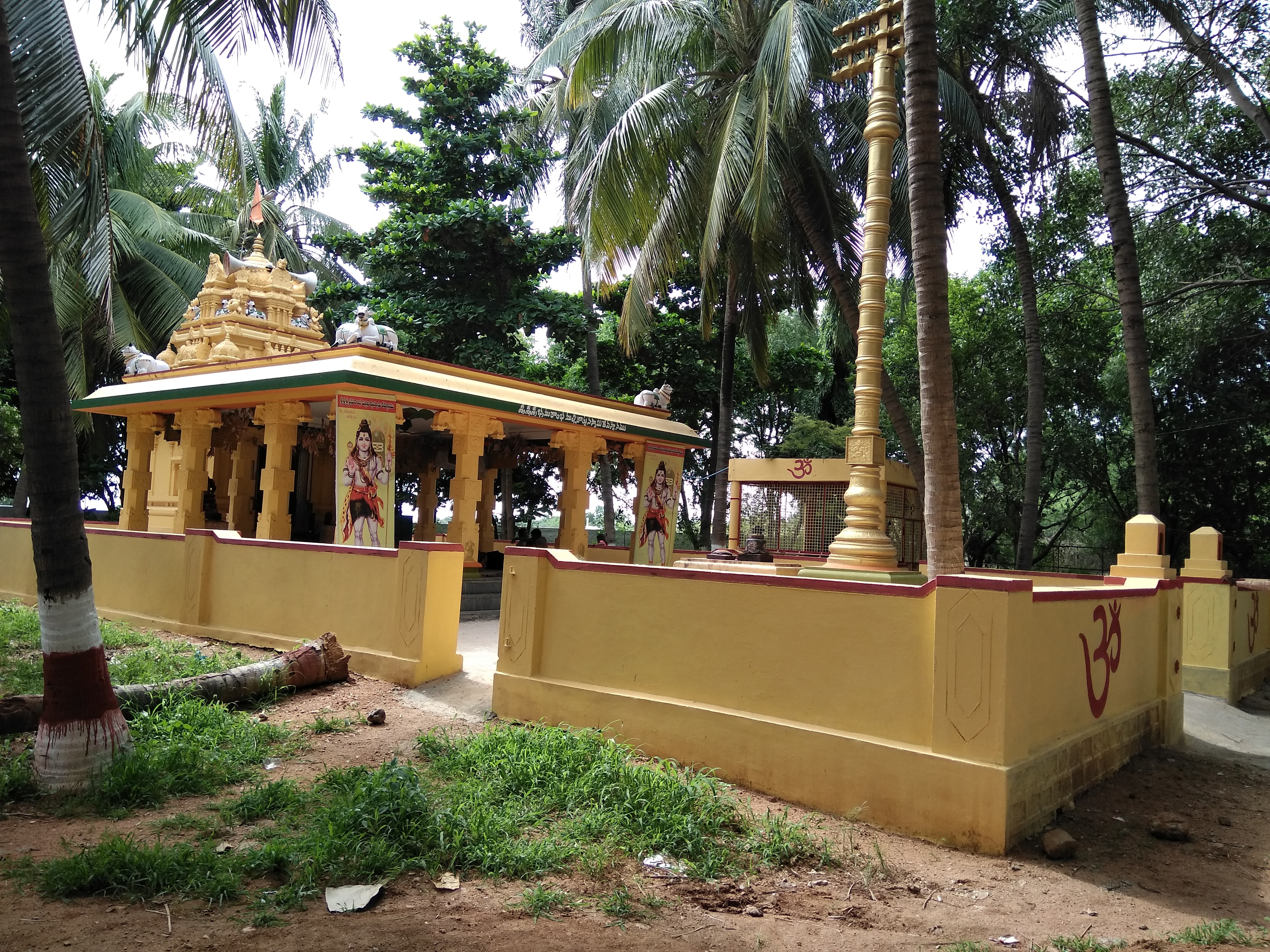 శ్రీభ్రమరాంబ మల్లికార్జునస్వామి దేవాలయం, నందిమళ్ళ